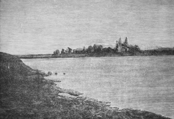 Беларуская (тарашкевіца): Глыбокае (Hłybokaje), возера Падлазнае (Padłaznaje) і прадмесьце Беразьвечча (Bieraźviečča). Царква Сьвятых Апосталаў Пятра і Паўла і манастыр базылянаў